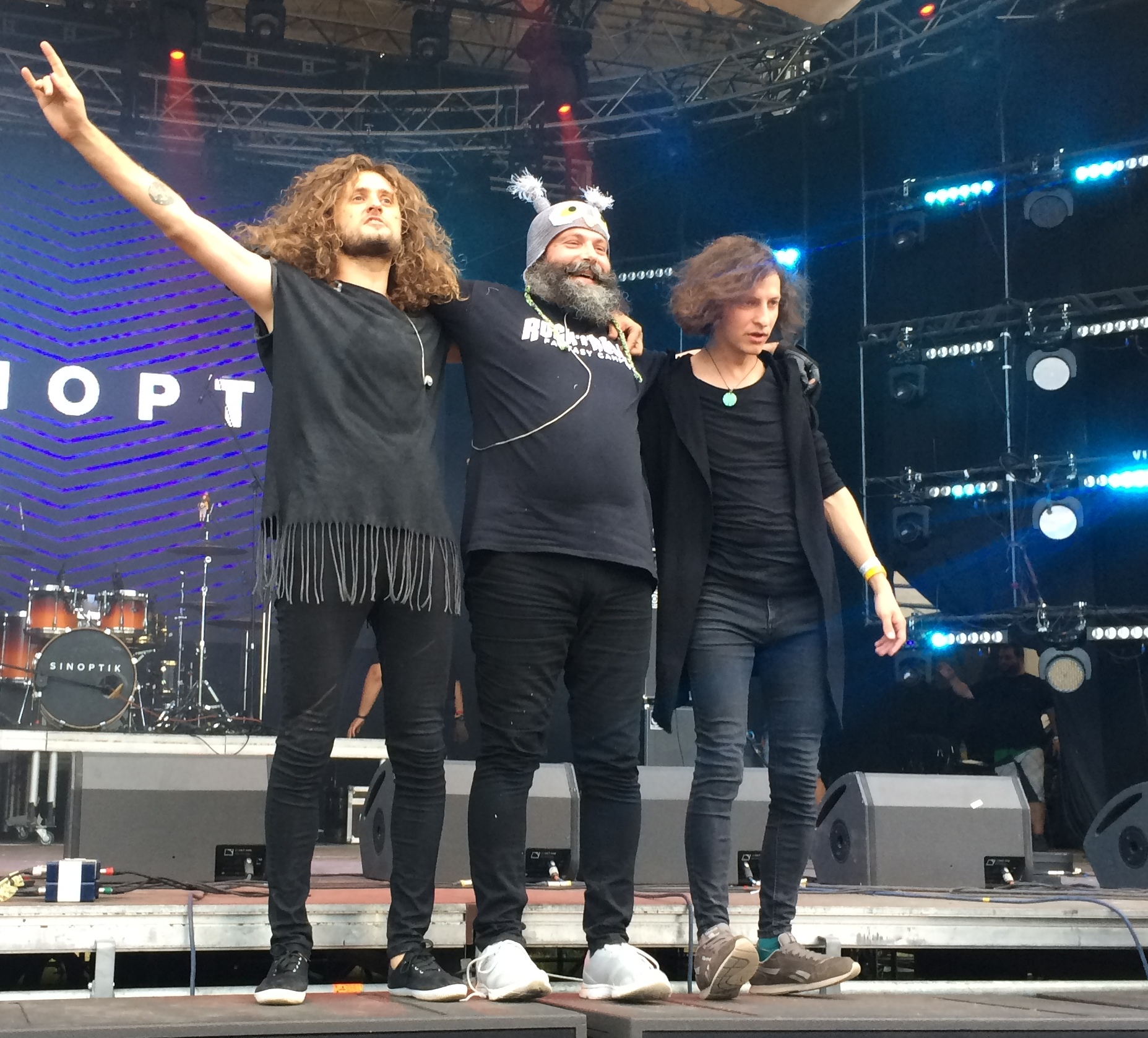 Atlas Weekend 2017. Виступ Sinoptik